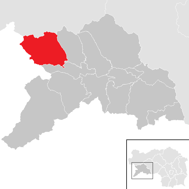 Lage von Krakau im Bezirk Murau